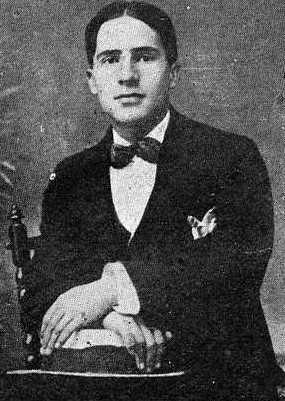 Julio Prieto Nespereira, fotografía en Vida Gallega 1917